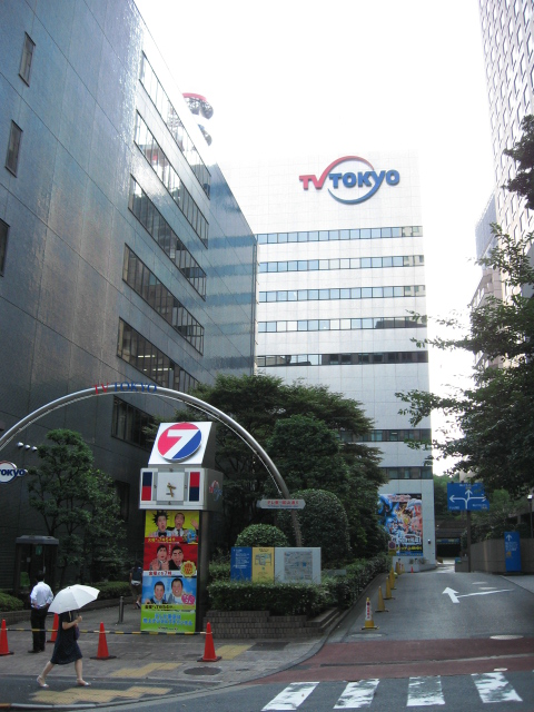 東京都港区虎ノ門にあるテレビ東京本社ビル（日経電波会館）。